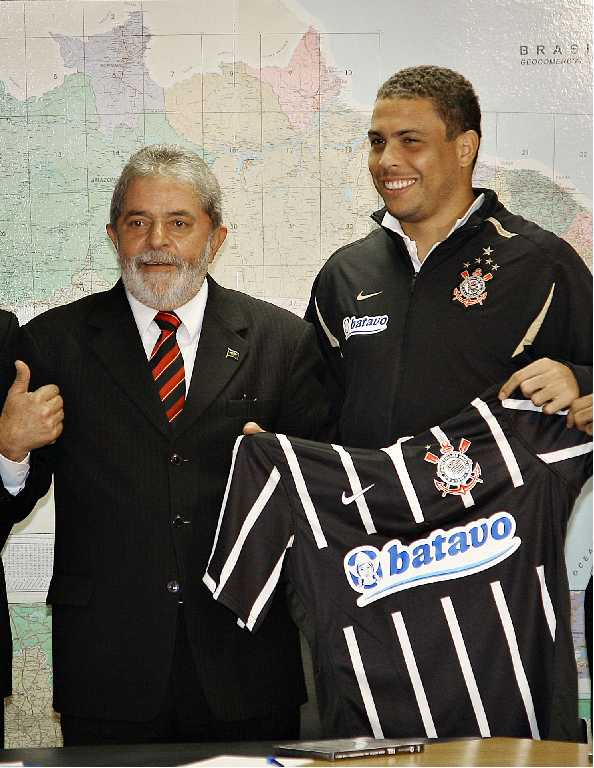 Presidente Lula com o jogador Ronaldo durante encontro no escritório regional da Presidência da República